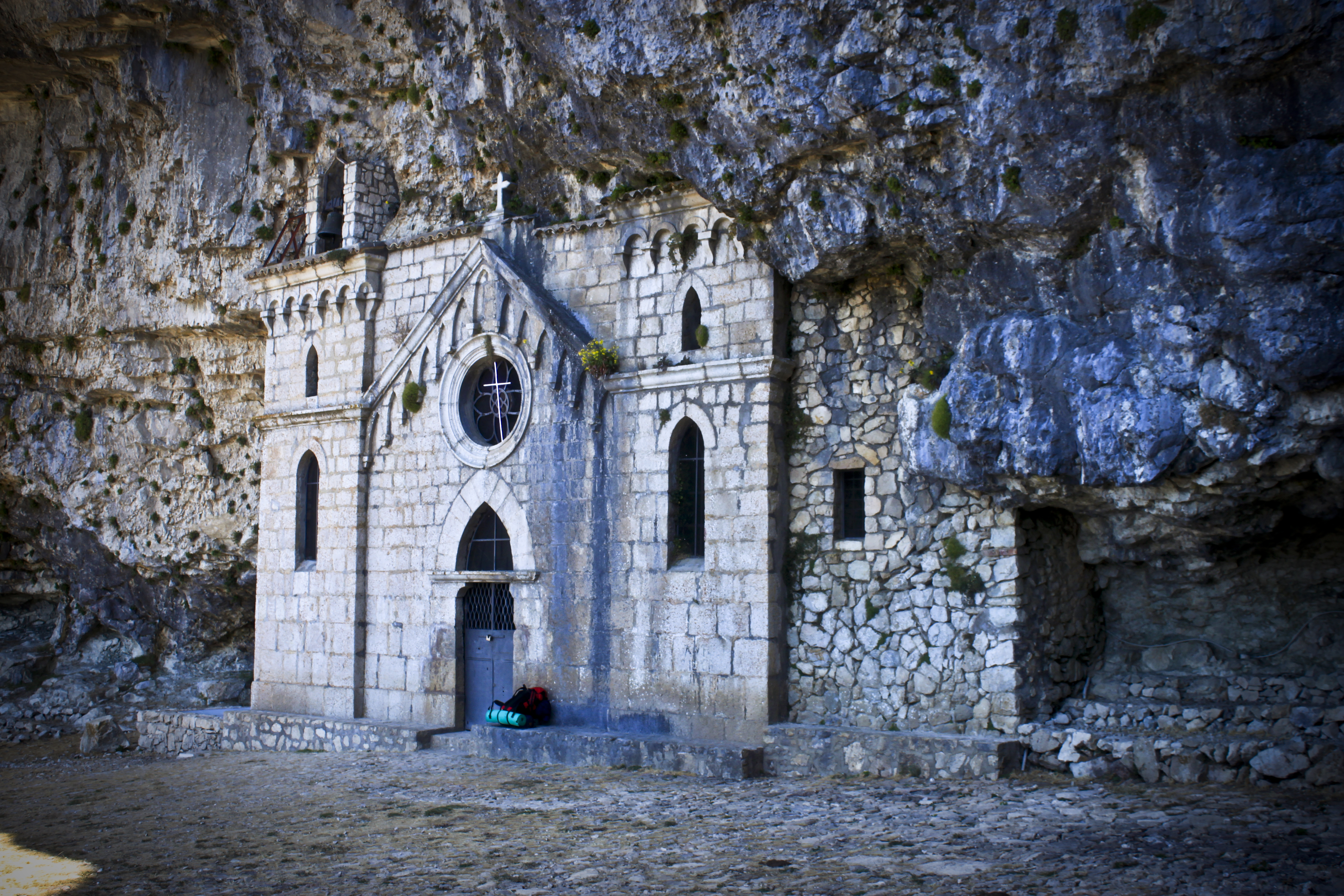 Fotografia di Gabriele Altimari